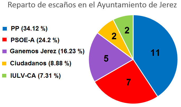 Escaños Jerez 2015